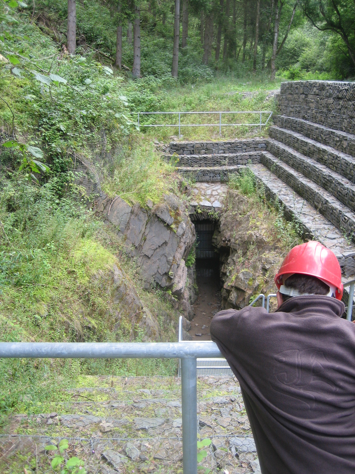 D'Entrée vun der Koffergrouf vu Stolzebuerg